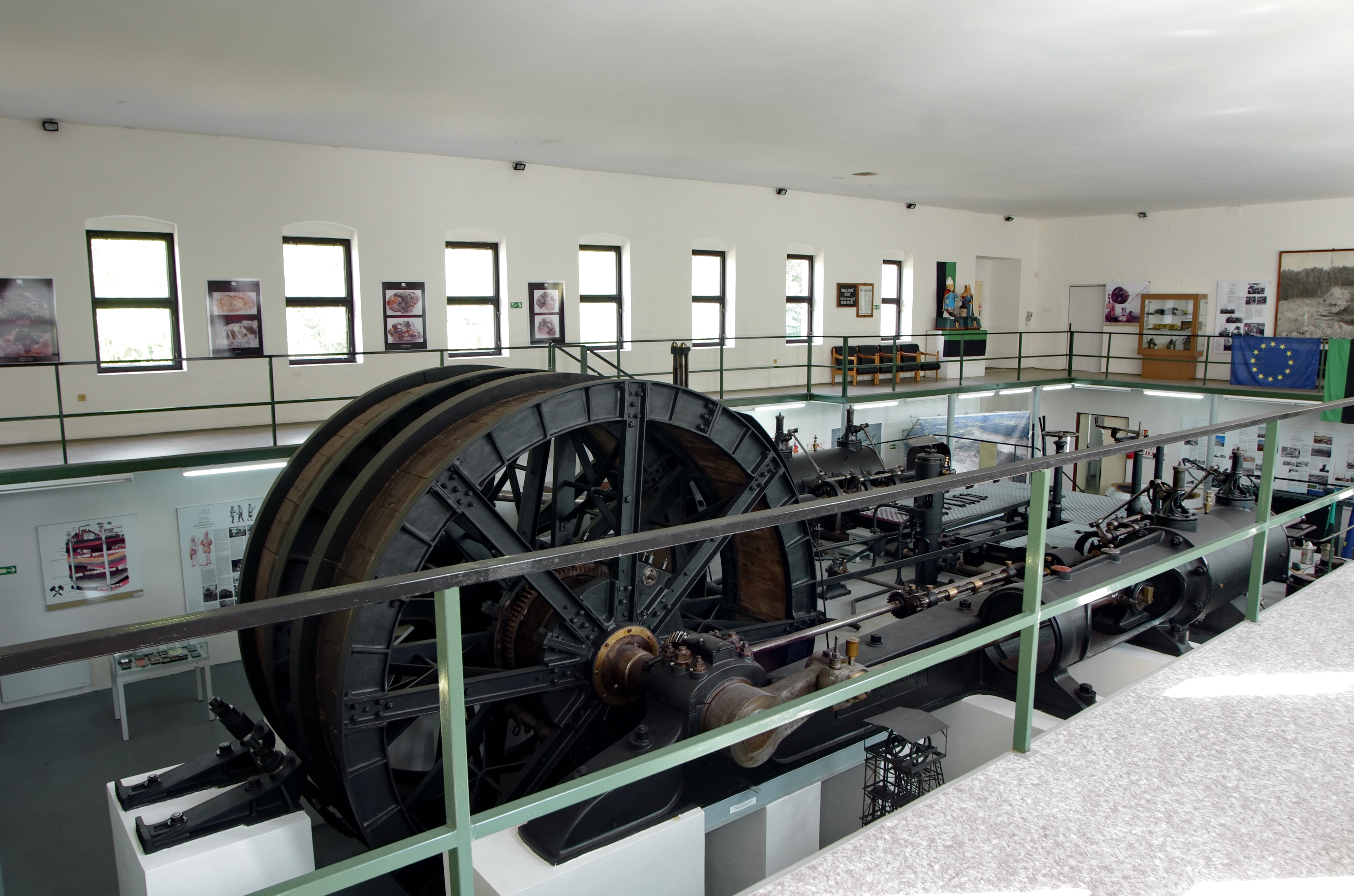 Krásno, hornické muzeum - parní těžní stroj z dolu Marie v Královském Poříčí, okres Sokolov